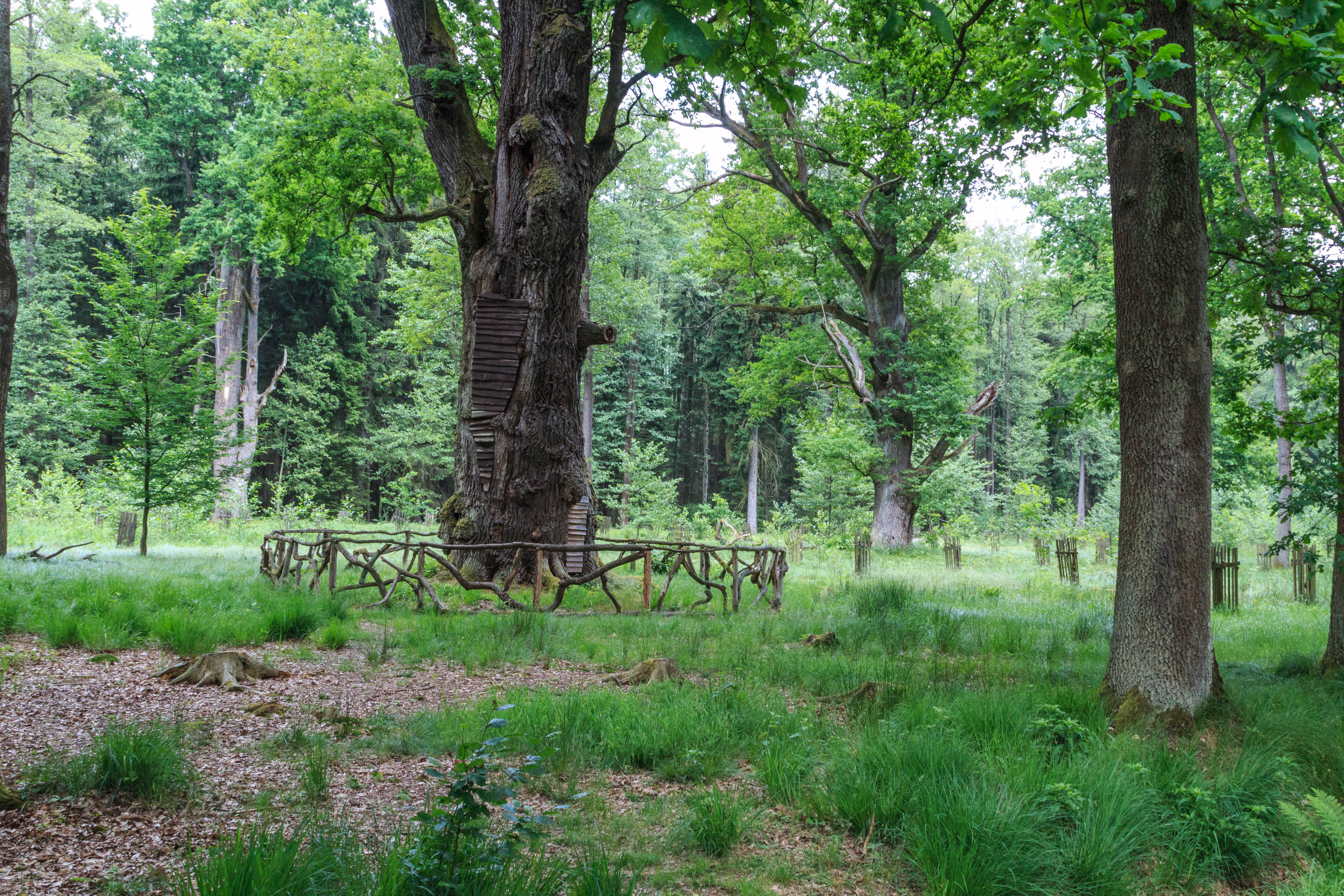 PR U Houkvice Project: Chráněná území.